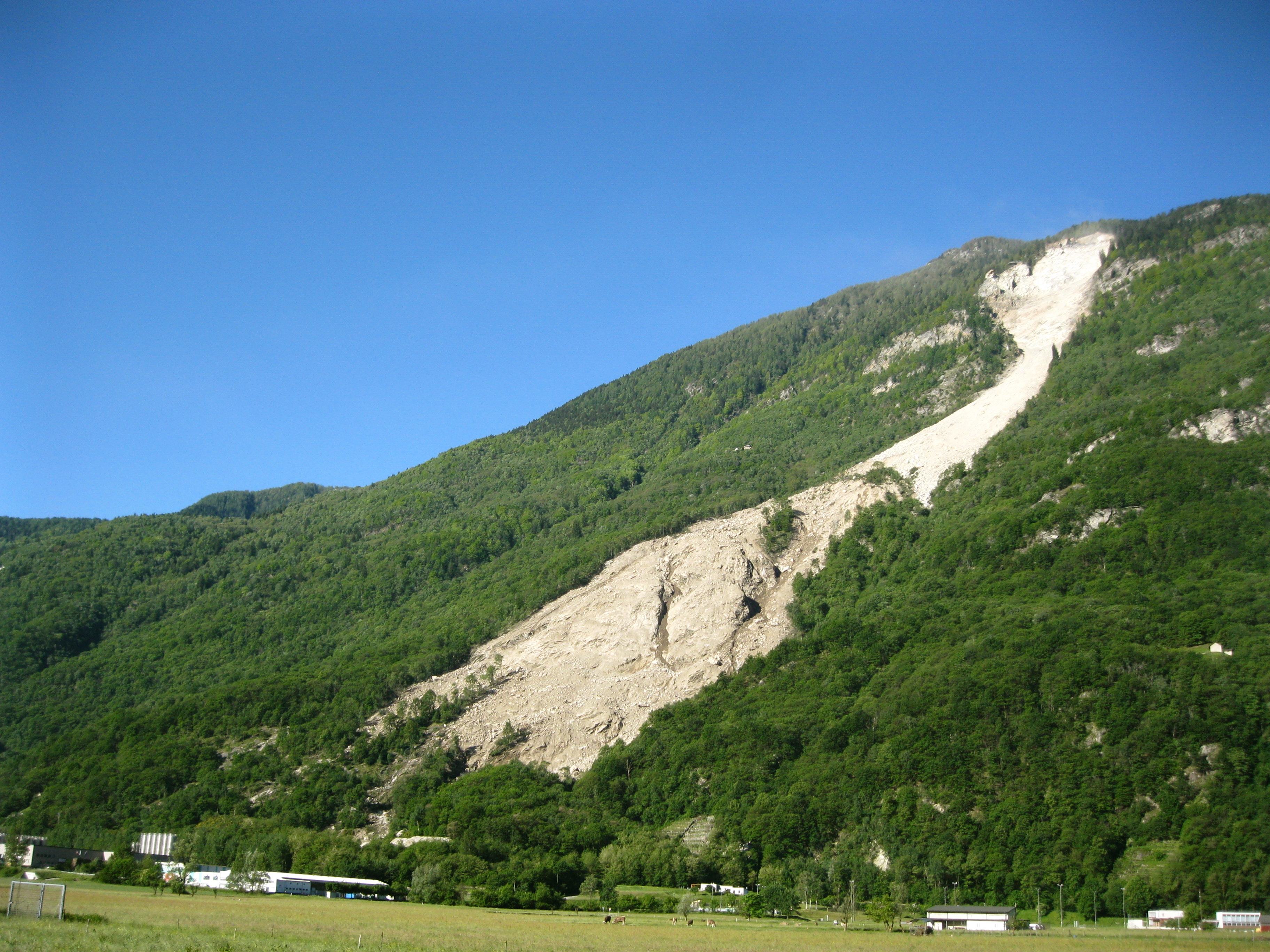 La frana del Valegion dopo il cedimento del terreno del 15 maggio 2012